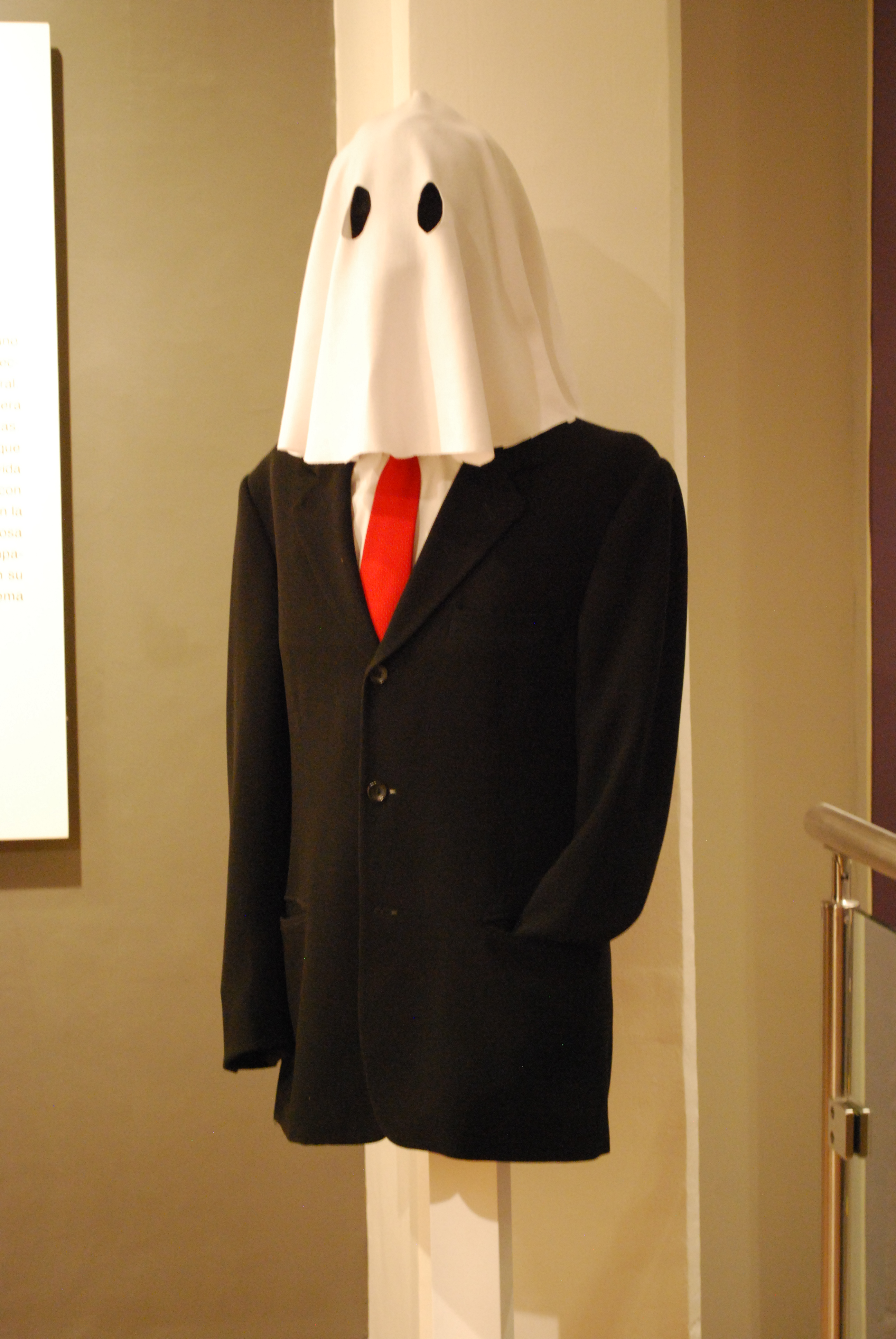 Mannequin depicting a "tapado" This refers to the old process of selecting party candidates by political bosses rather than the membership, with no one knowing who the candidate would be until the party announced it. At the Museo del Objeto del Objeto